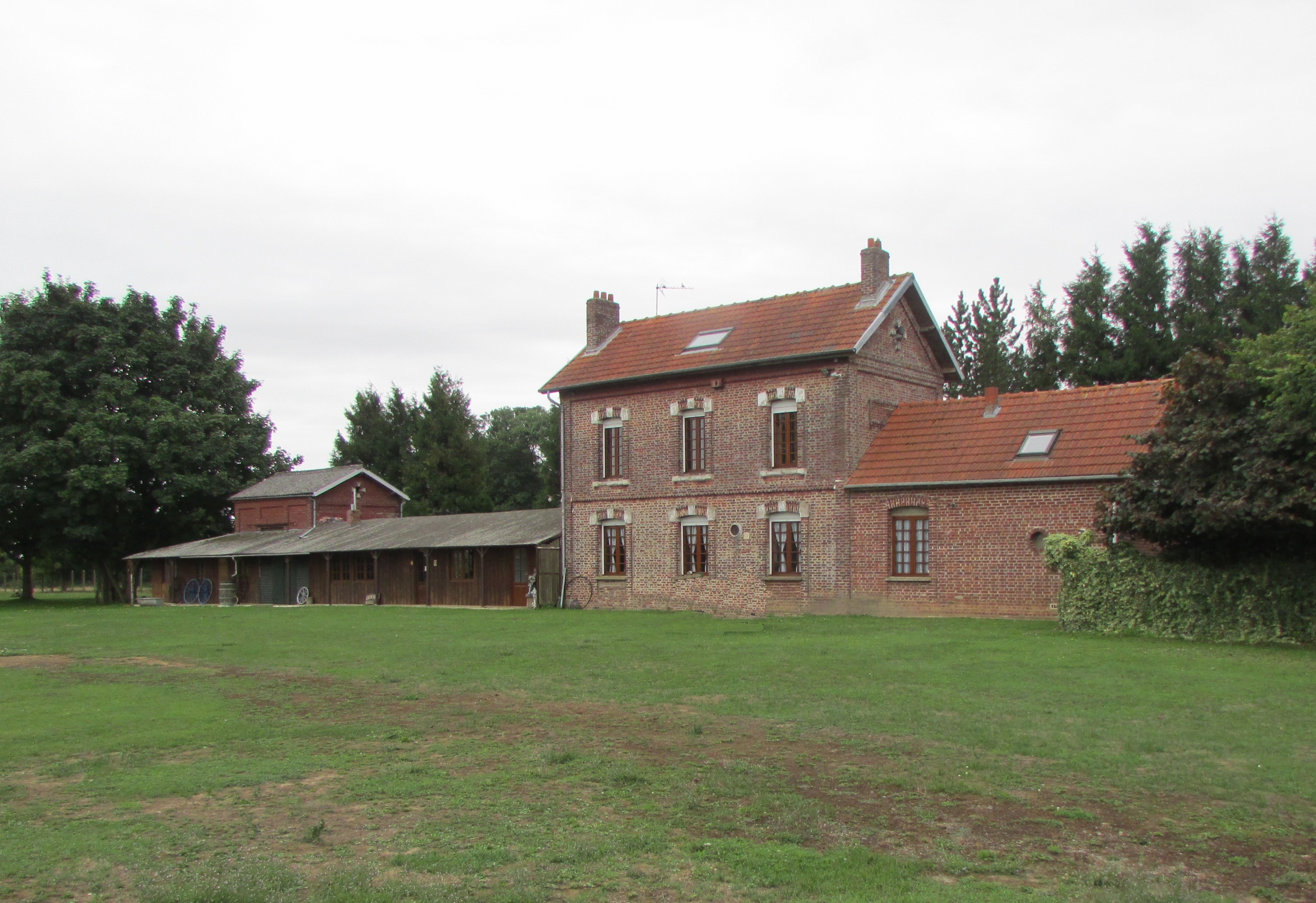 L'ancienne gare.